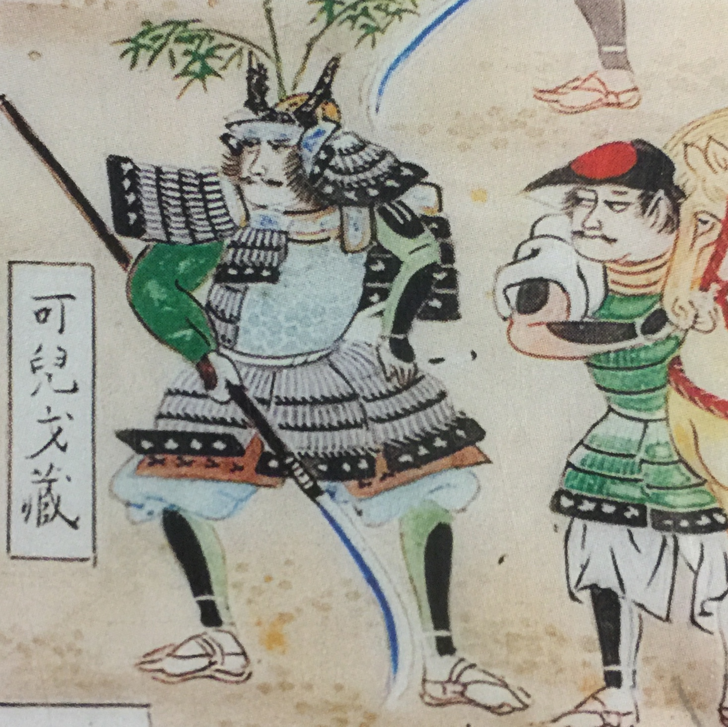 関ヶ原合戦図屏風（関ケ原町歴史民俗資料館本）に描かれた、福島正則家臣の可児才蔵（吉長）。